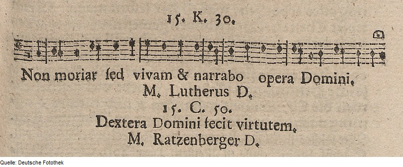 Original image description from the Deutsche Fotothek Vers & Note